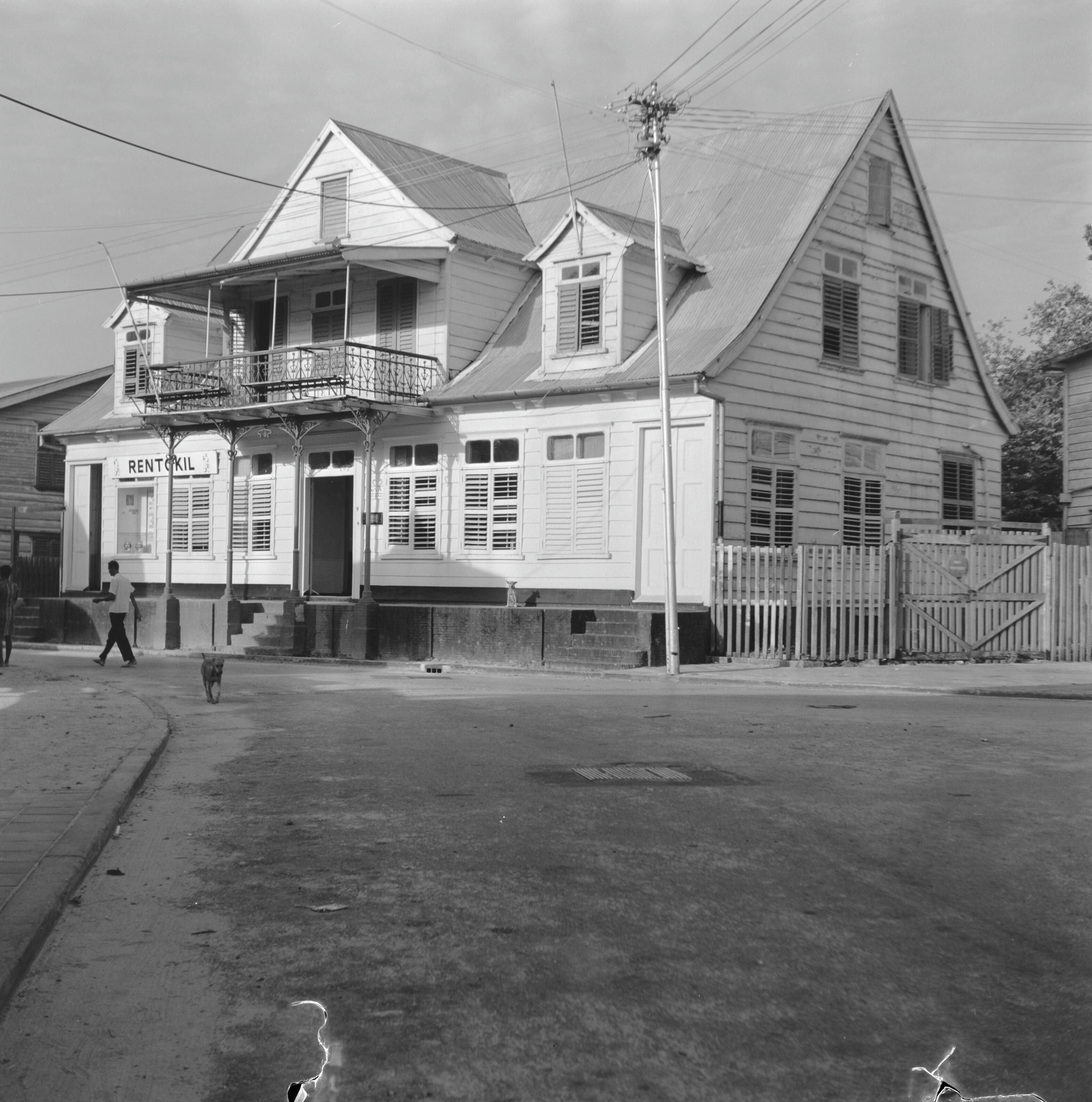 Kromme Elleboogstraat 9, overzicht Onderwerp: Huizen, woningen